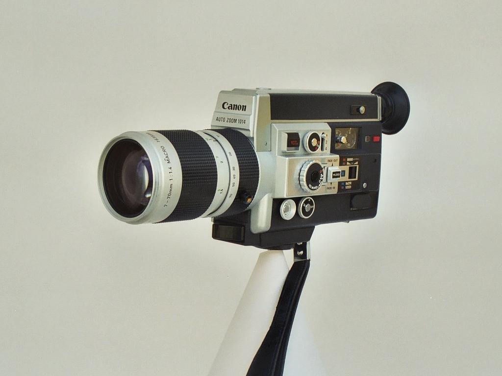 A Canon Auto Zoom 1014 film camera.